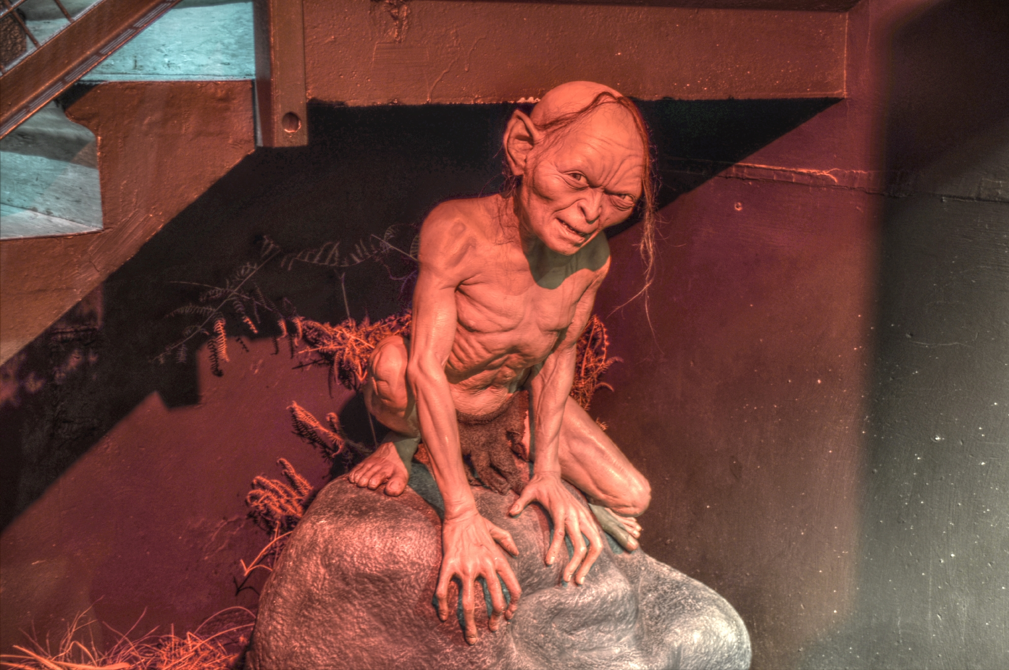 Camera: Nikon D5000 Luminance HDR, Mantiuk '06